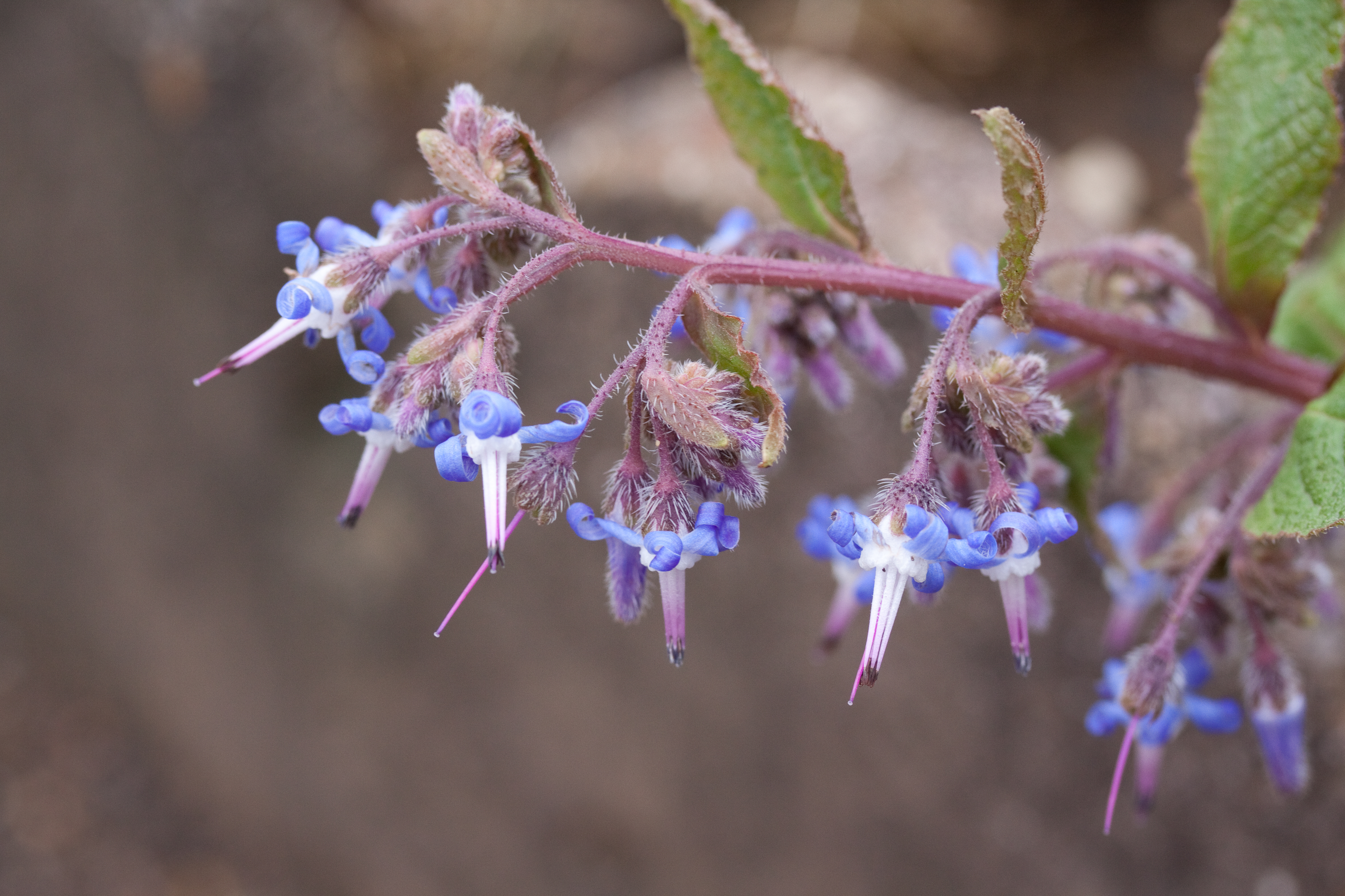 Fleurs Trachystemon orientalis - Jardin des Plantes - Paris